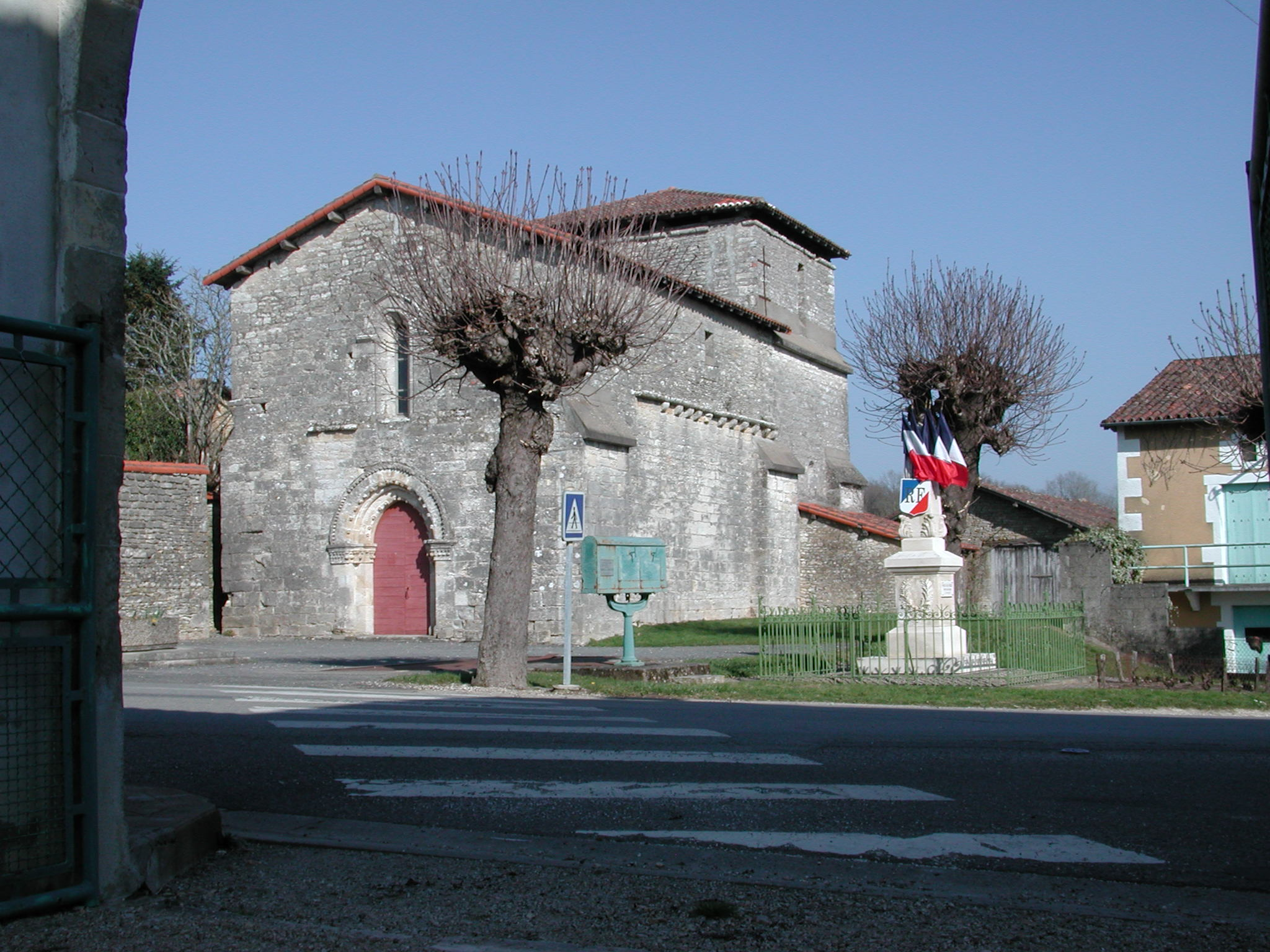 Photo de l'église du Grand-Madieu. Auteur : Martin Maas